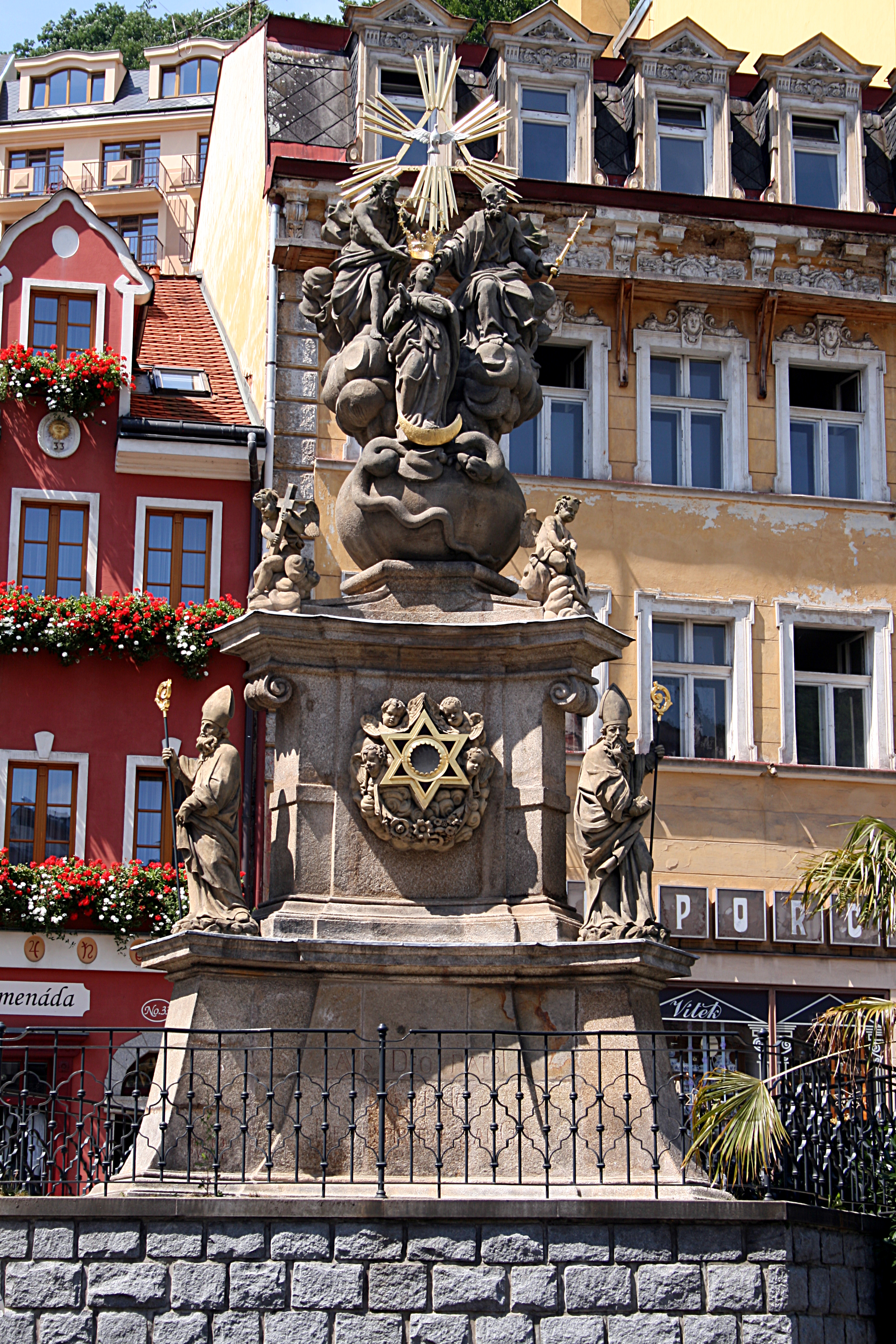 Karlsbad, Pestsäule